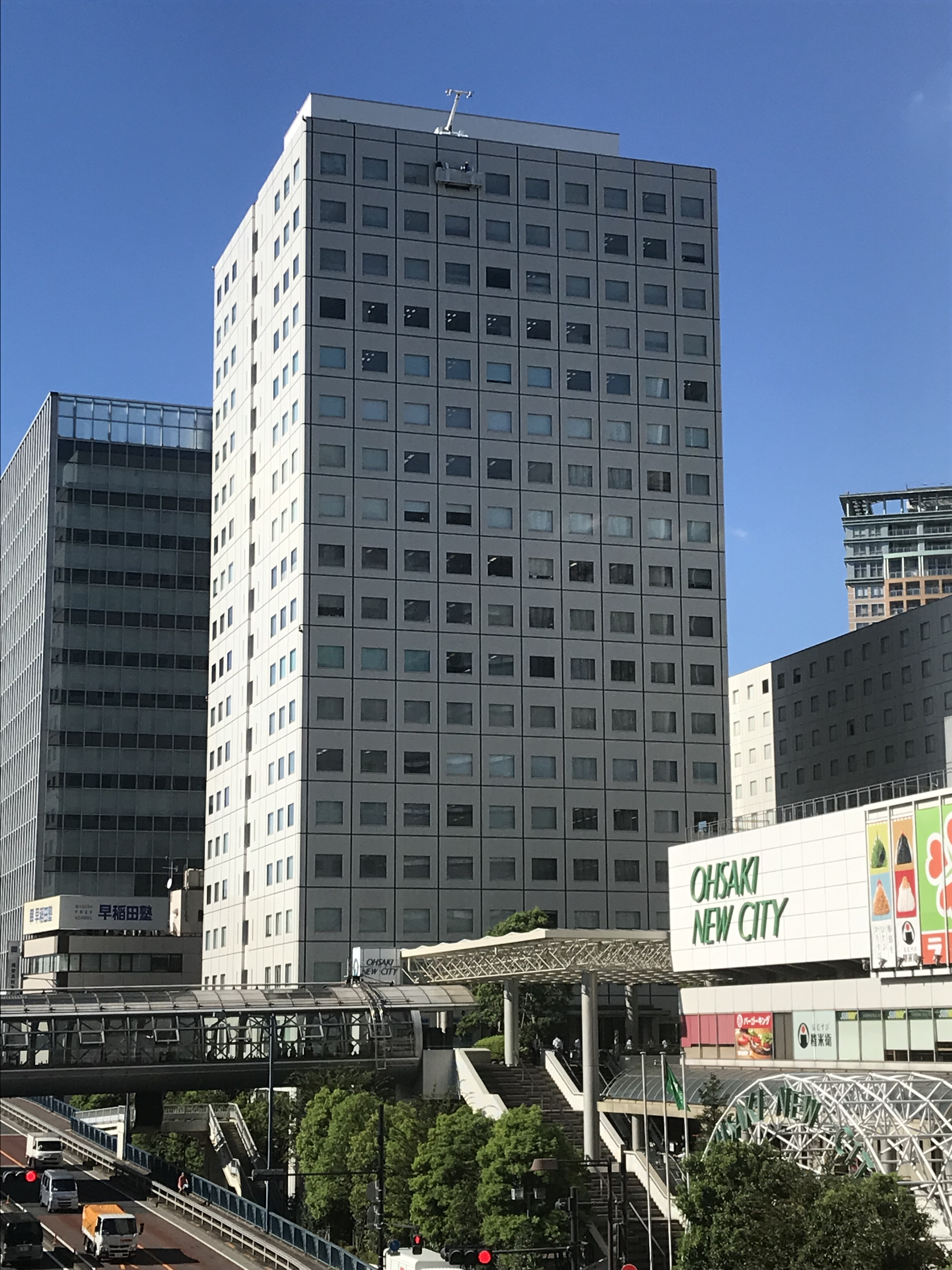 パトライト東京営業所所在ビル